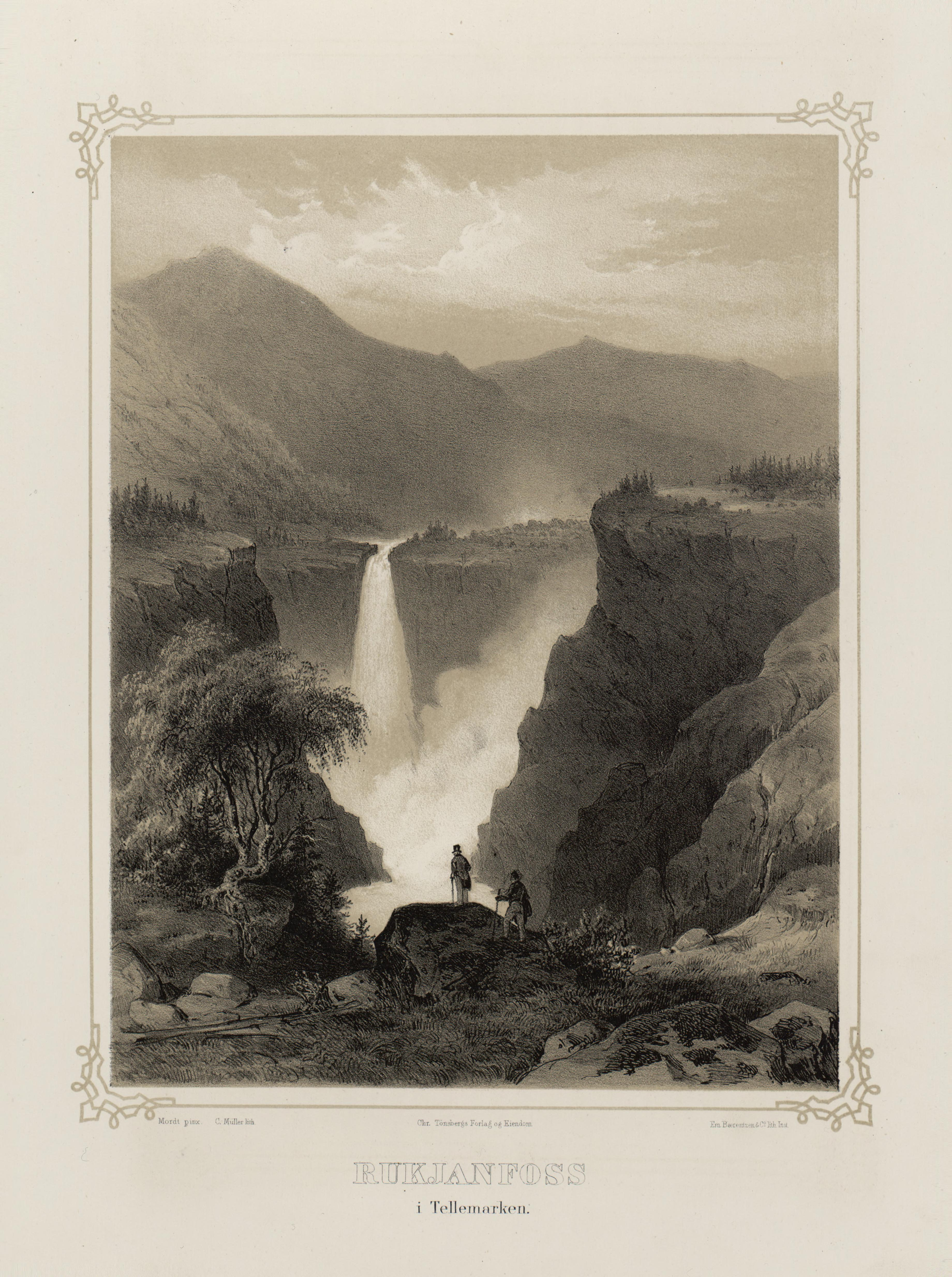 Rjukanfoss i Tellemarken. Illustrasjon hentet fra boken "Norge fremstillet i Tegninger" av Asbjørnsen, P.Chr. og utgitt av Chr. Tønsberg (no, 1848)